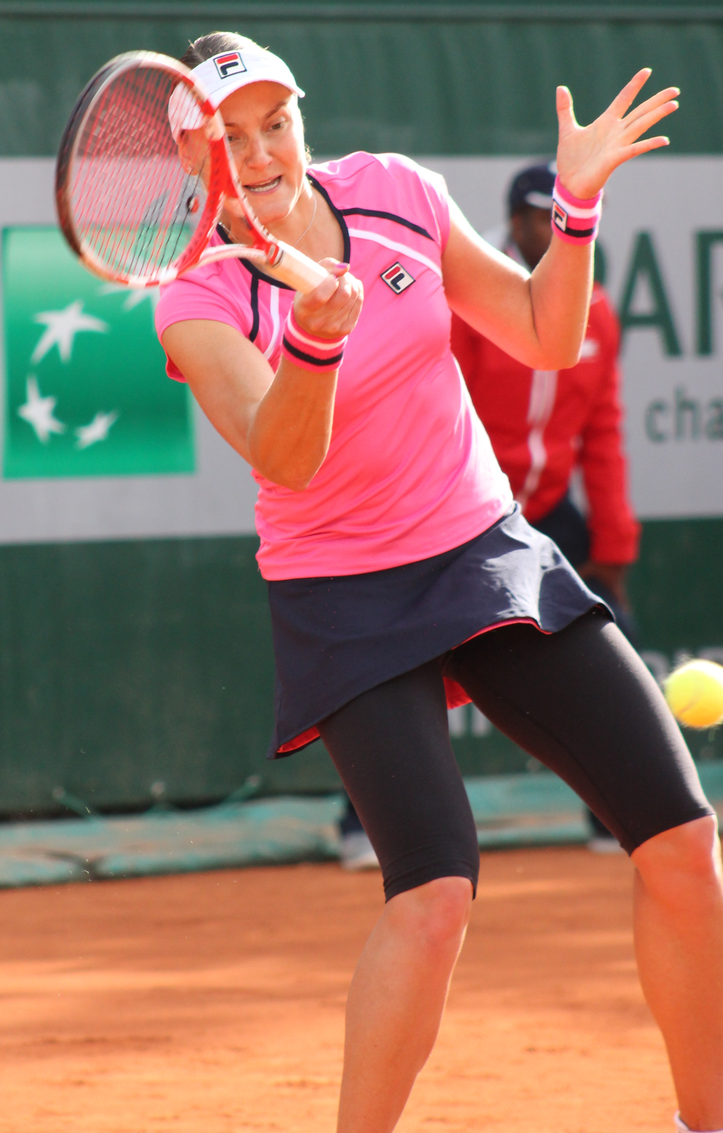 Petrova RG13 (8)